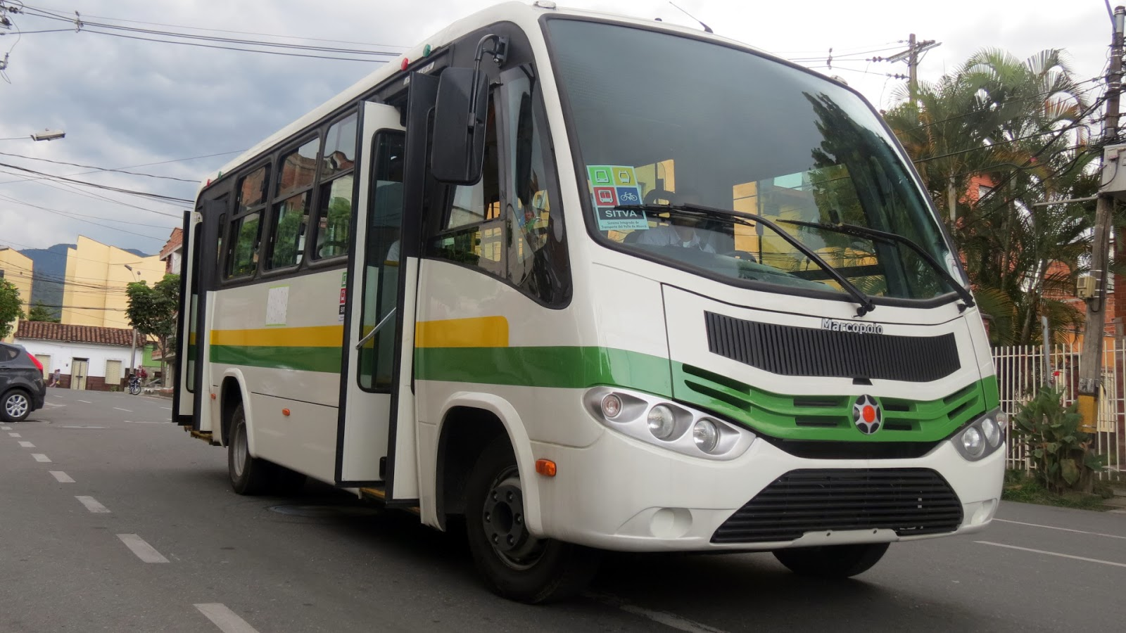 Alimentador Metroplus